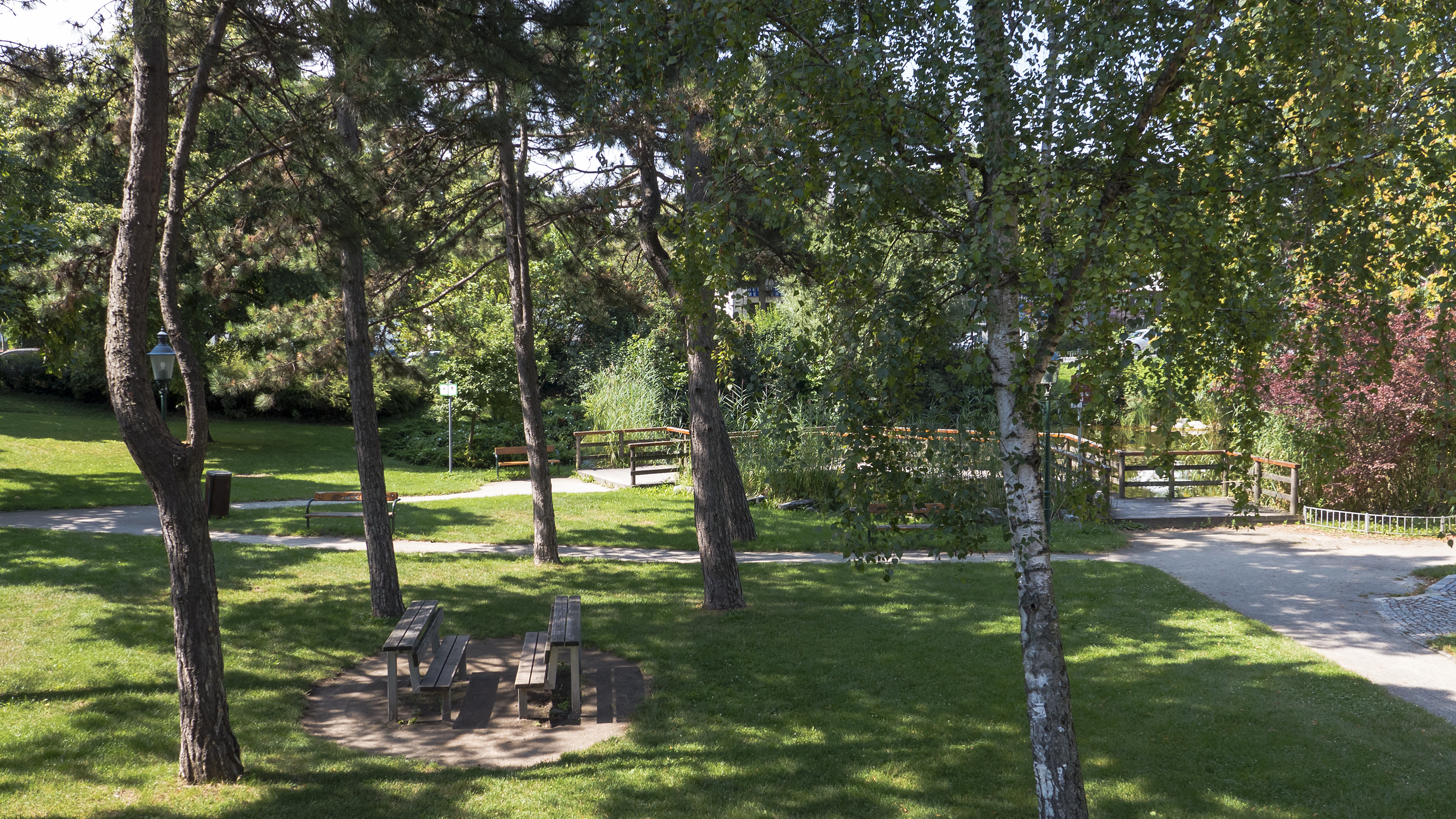 Bill-Grah-Park in Wien 22